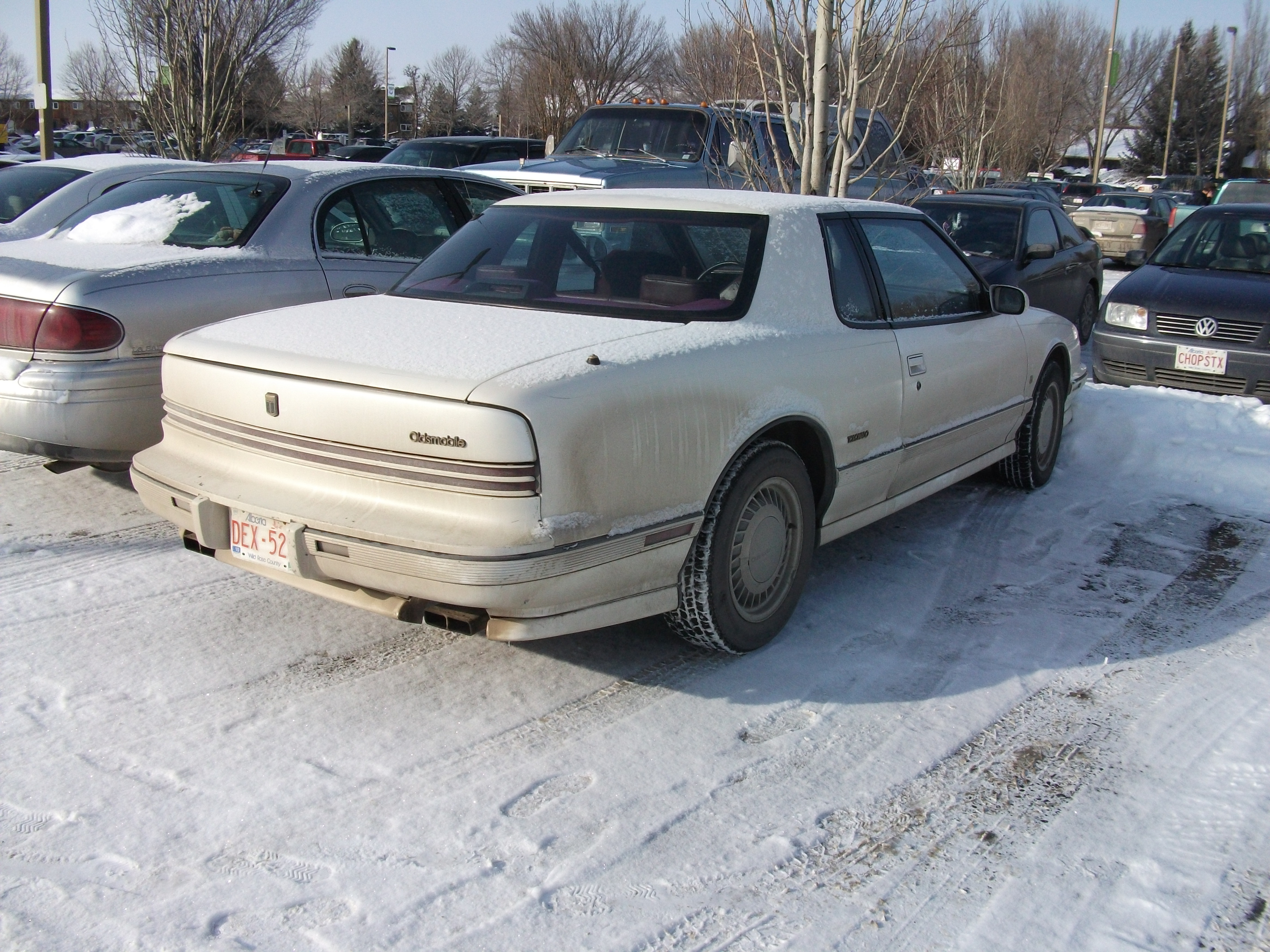 Oldsmobile Tornado